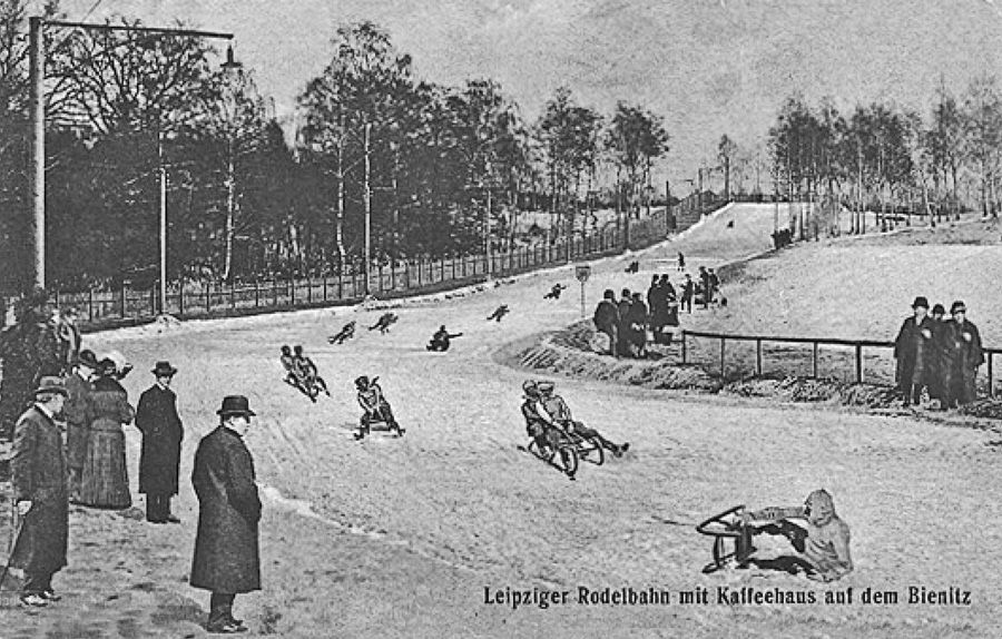 Postkarte von der Rodelbahn auf dem Bienitz